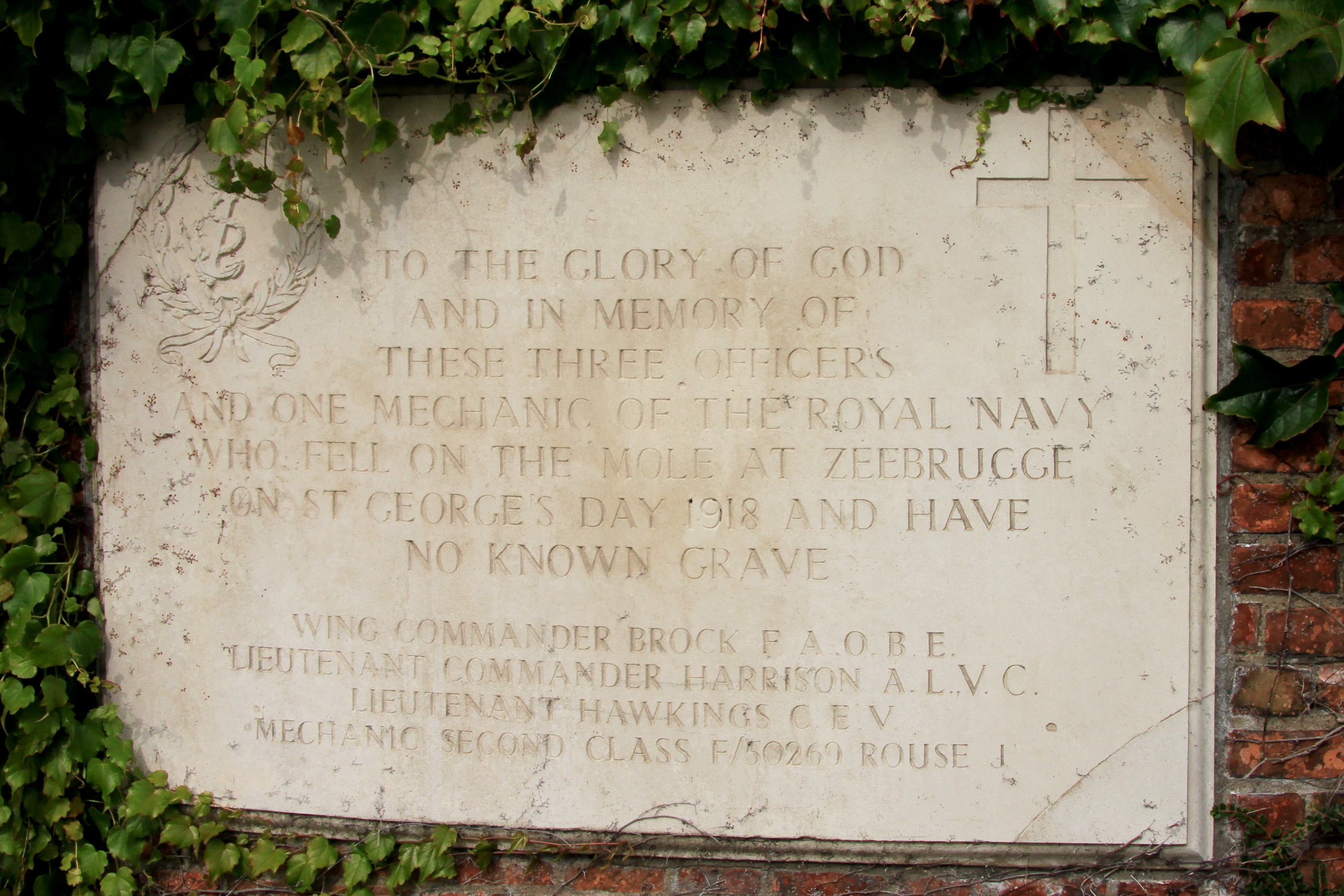 Zeebrugge Churchyard